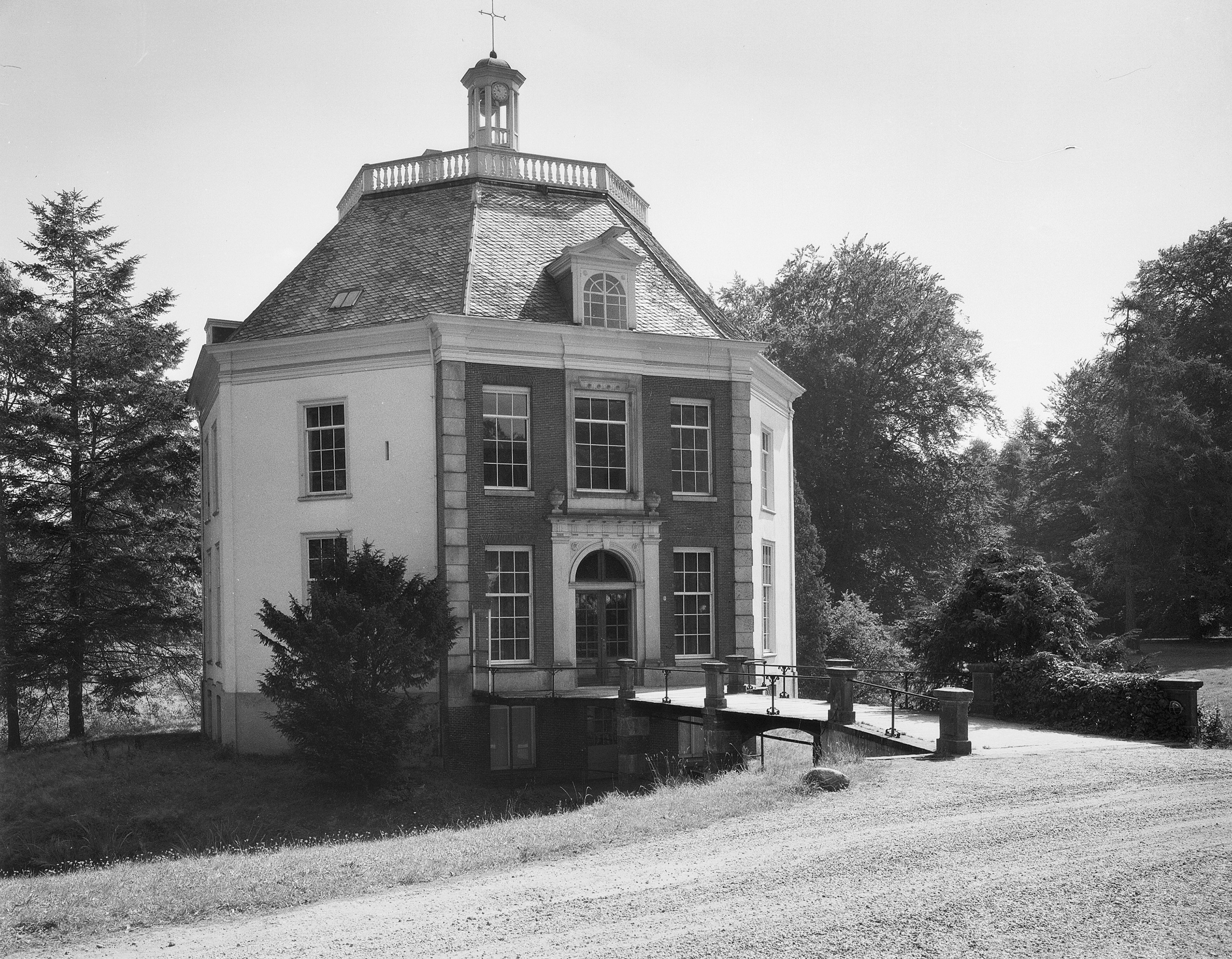 Lage Vuursche, Huis Drakensteijn : exterieur naar het zuid-oosten